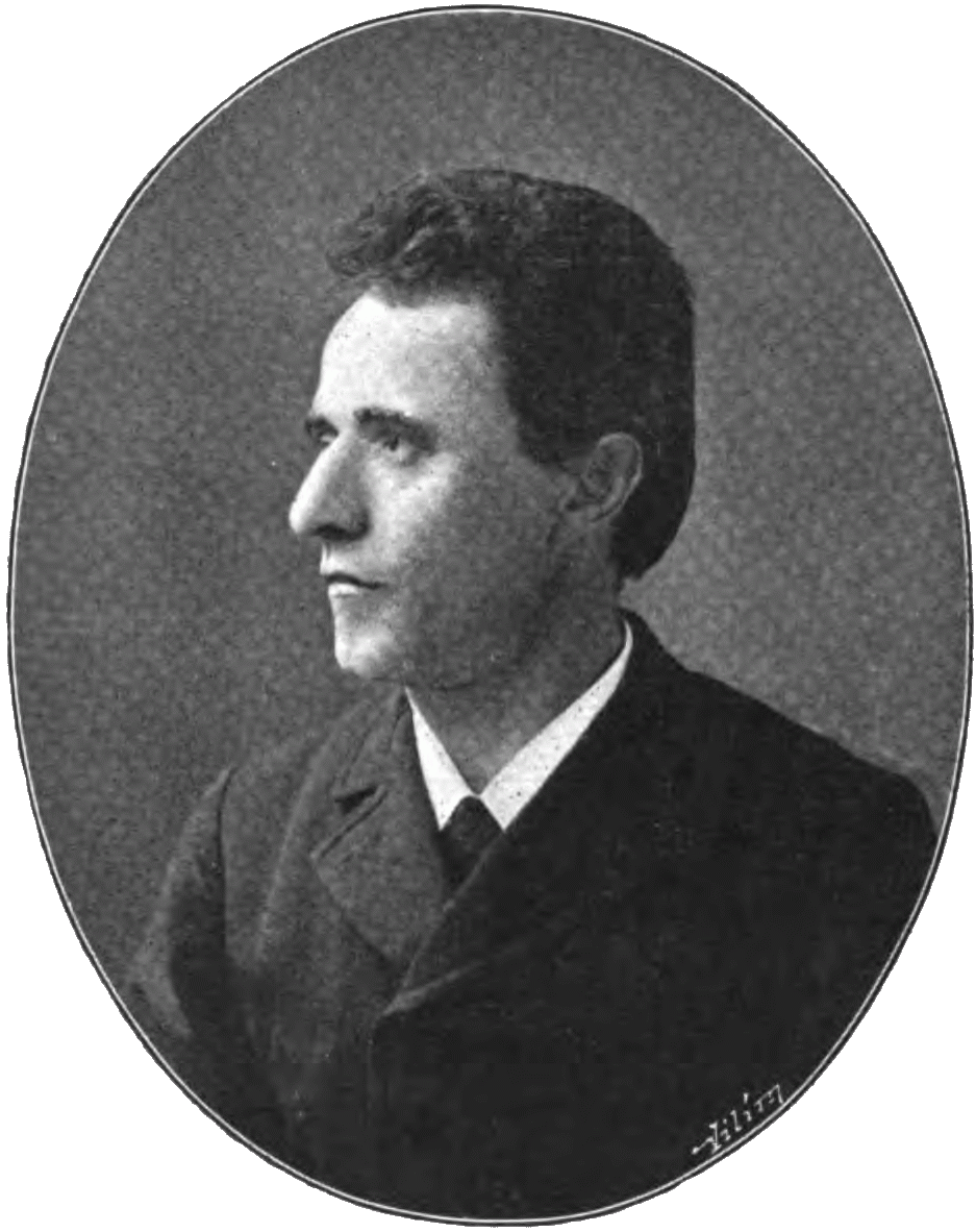 Vjekoslav Spinčić (1848–1933), Croatian politician